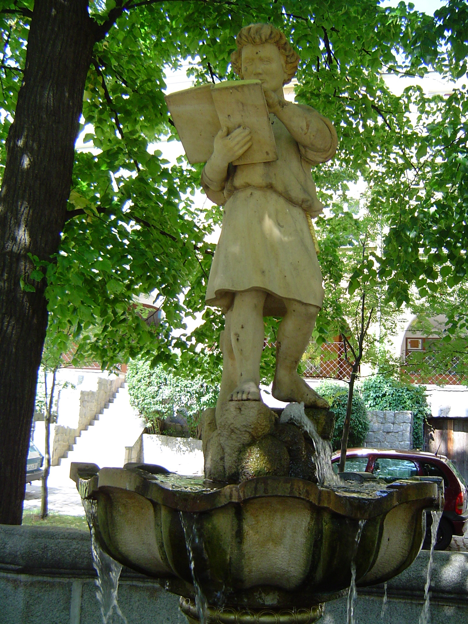 Figura chłopca na anielskiej fontannie w Bolkowie